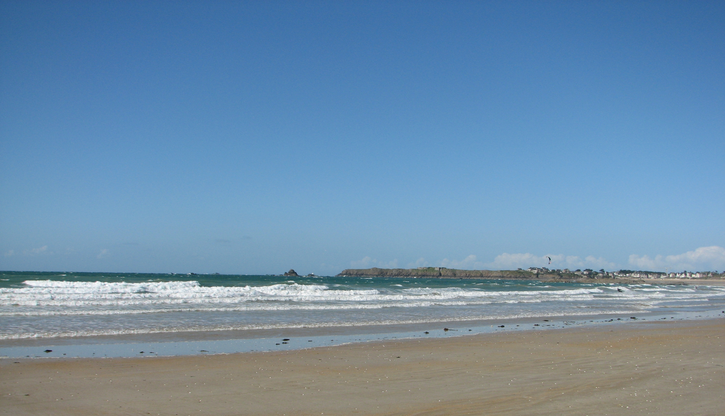 Vue depuis la plage de Rochebonne à Paramé (Saint-Malo) avec la pointe de la Varde en arrière plan.